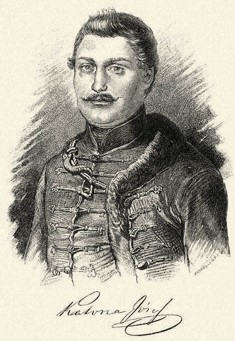 Katona József. Morelli Gusztáv fametszete. Megjelent Az Osztrák-Magyar Monarchia írásban és képben (1887–1901) kiadványban